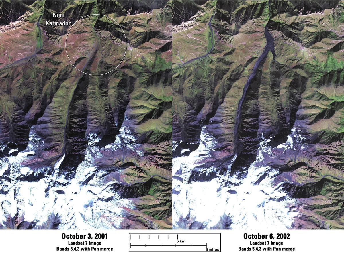 Vergleichende Satellitenbilder der Karmadon-Schlucht vor dem Lawinenabgang (3. Oktober 2001) und nach dem Lawinenabgang (6. Oktober 2002). Deutlich zu sehen: Der von der Lawine aufgeworfene Eisdamm am Eingang der Schlucht.